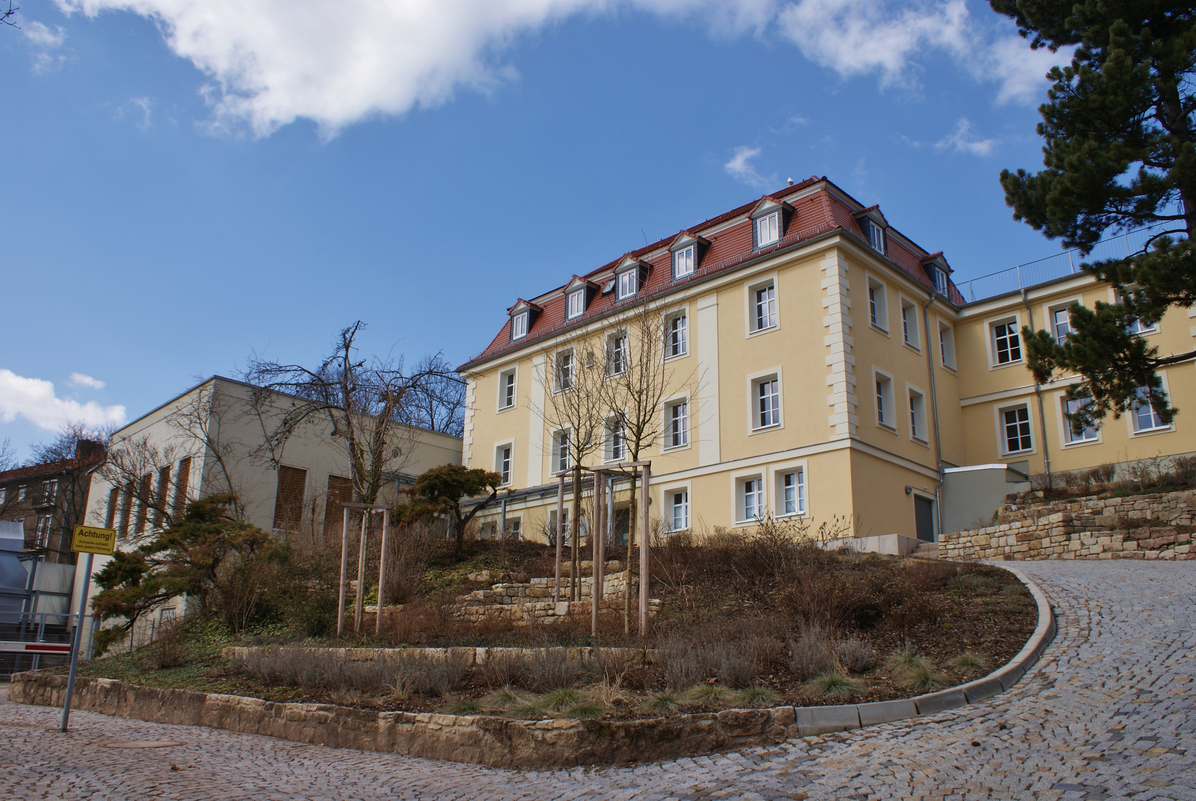 Das Jenaer Helmholtz-Institut am Fröbelstieg